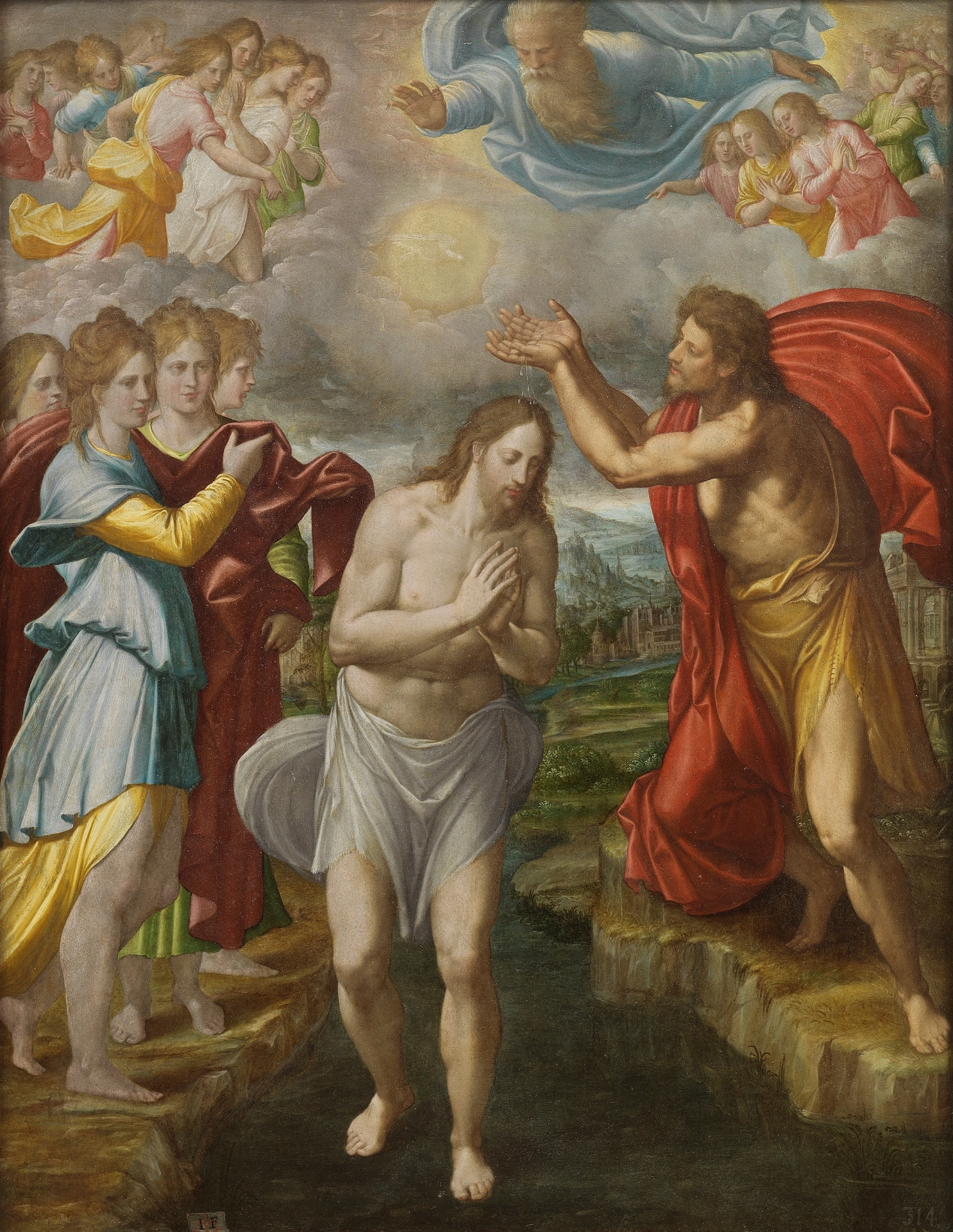 Bautismo de Cristolabel QS:Les,"Bautismo de Cristo"